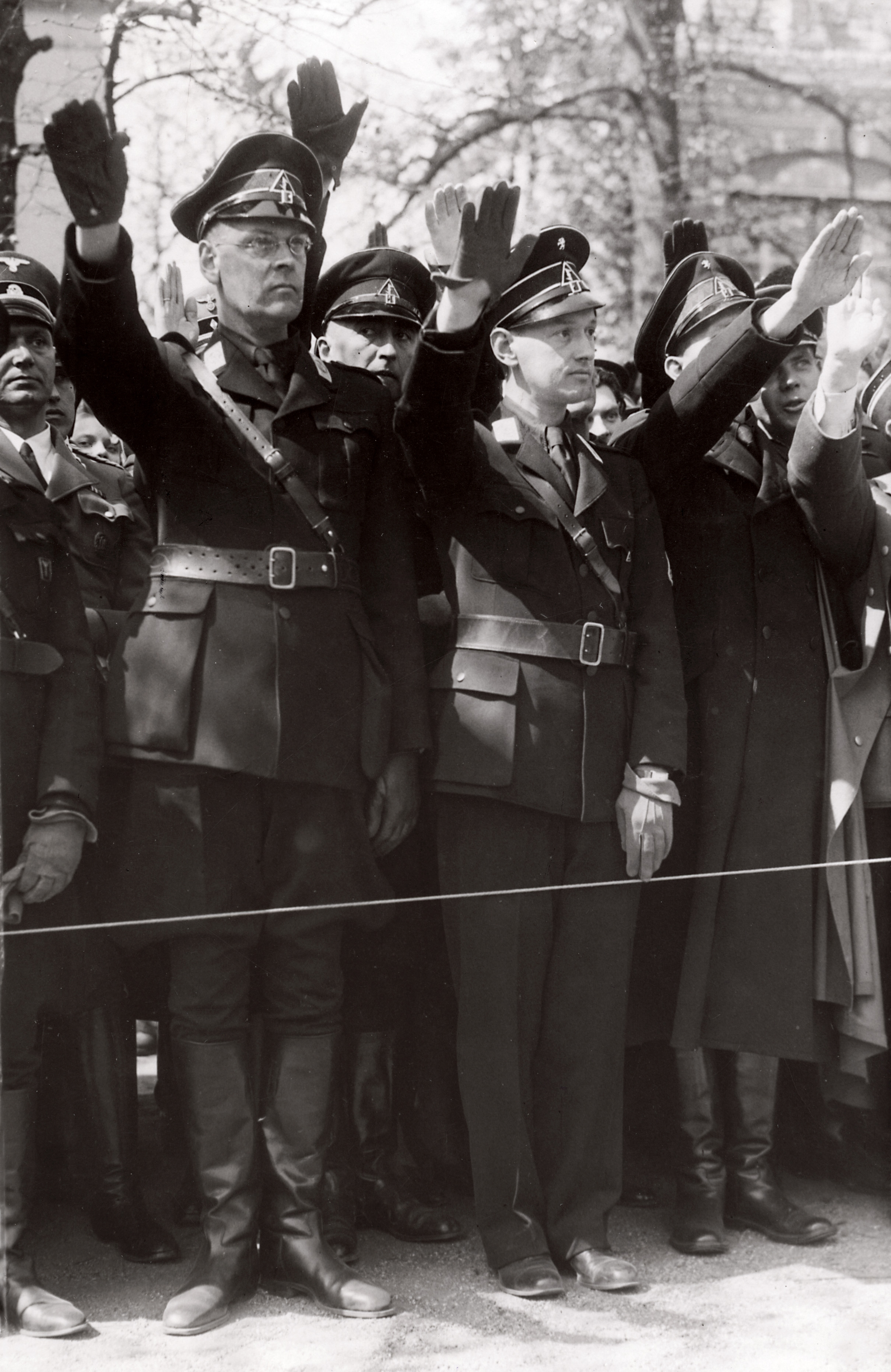 Ter gelegenheid van de 47ste verjaardag van den leider der NSB Ir. A.A. Mussert, wordt heden op de Maliebaan voor hem gedefileerd. De NSB-Secretaris- Generaal van het departement van Volksvoorlichting en Kunsten Dr. Th. Goedewaagen (links) en Dr. Ir. D.A. Herweijer, directeur-generaal Nederlandse Omroep, slaan het defilé gade, Den Haag, Nederland 11 mei 1941.